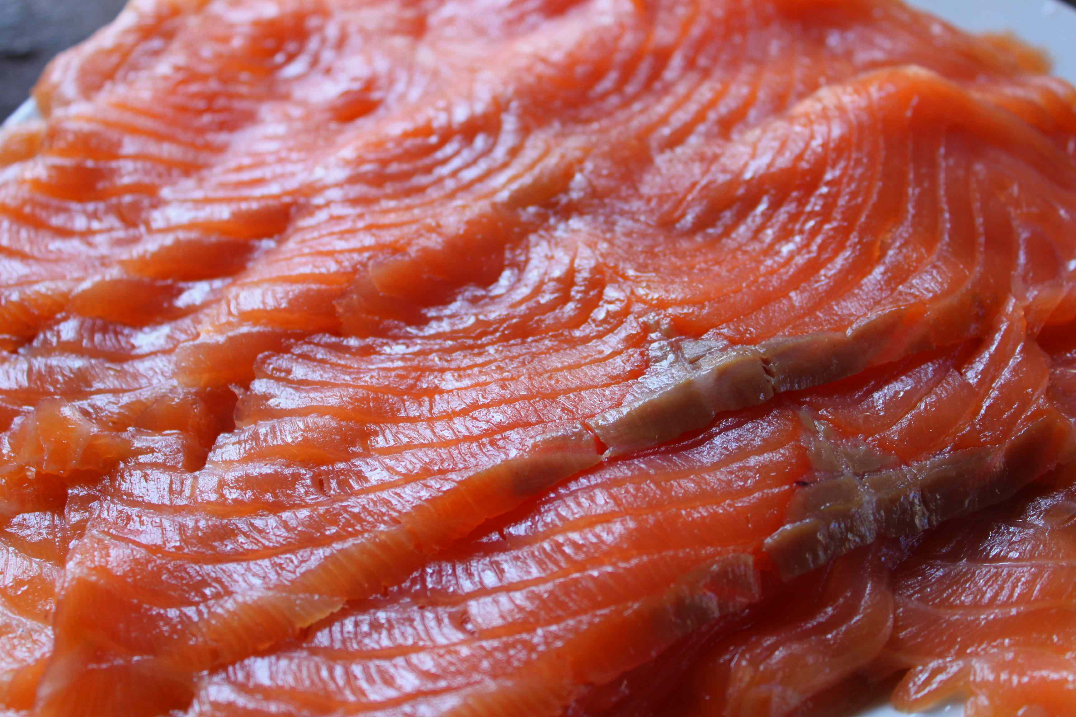 Lachs an der schwedischen Küste